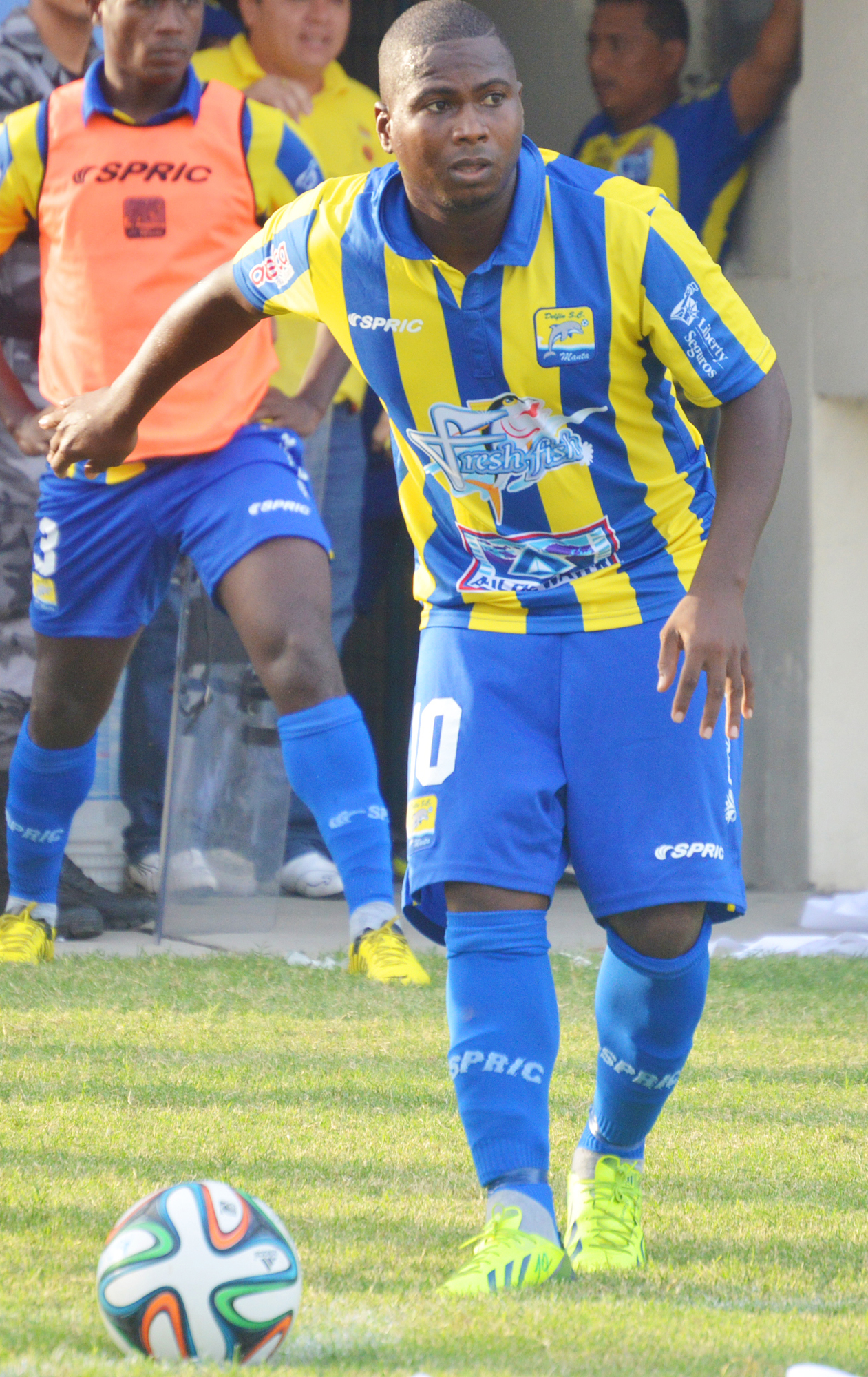 Joffre Pachito en Delfín Sporting Club de Manta en 2014